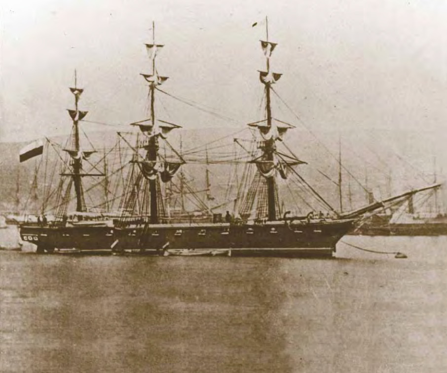 Corbeta Esmeralda, uno de los buques protagonistas de la Guerra del Pacífico, como parte de la escuadra de la Armada de Chile. Fue hundida en la rada del puerto de Iquique el 21 de mayo de 1879.